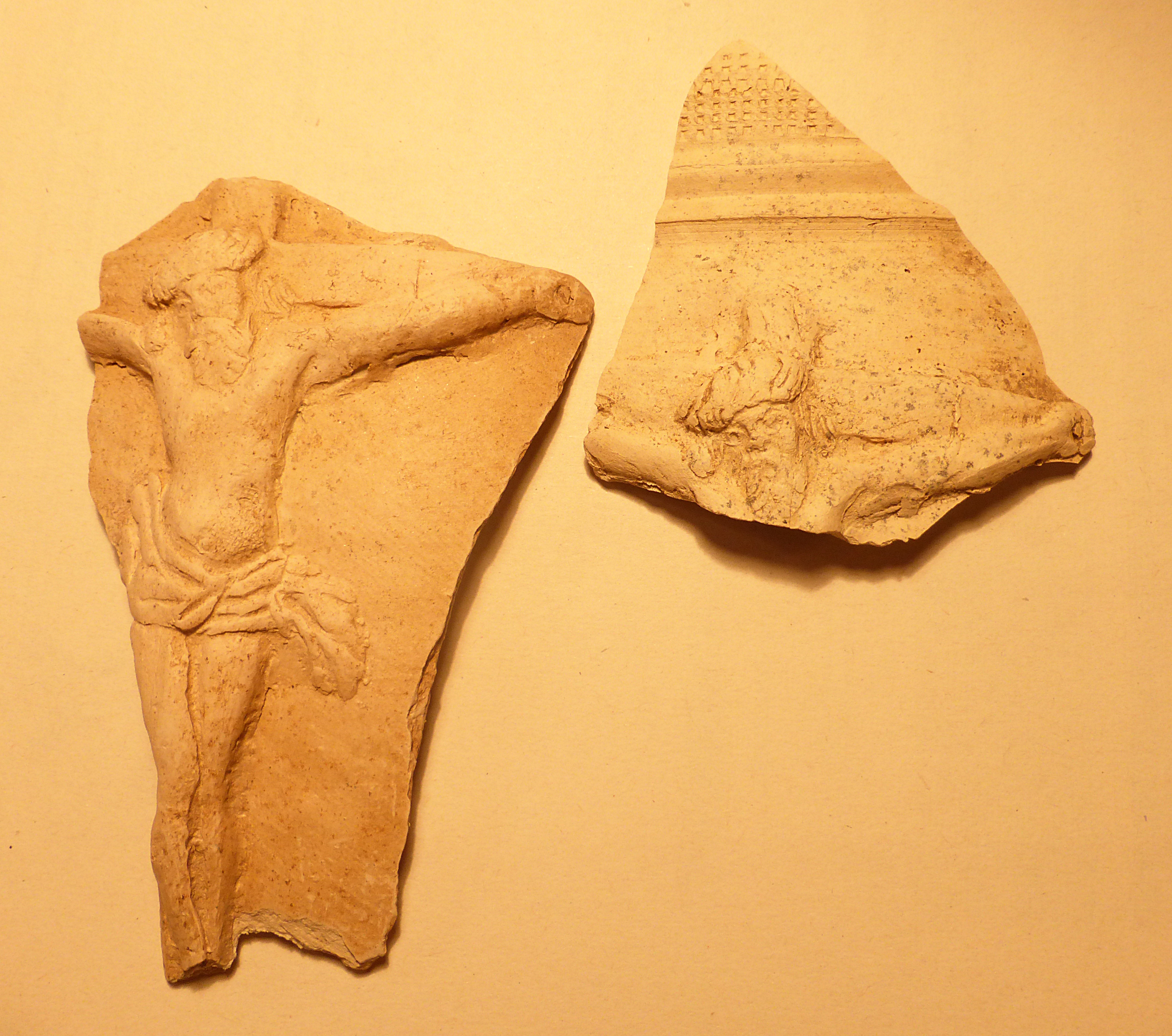 Tonfragment mit Christus am Kreuz aus Gschaid